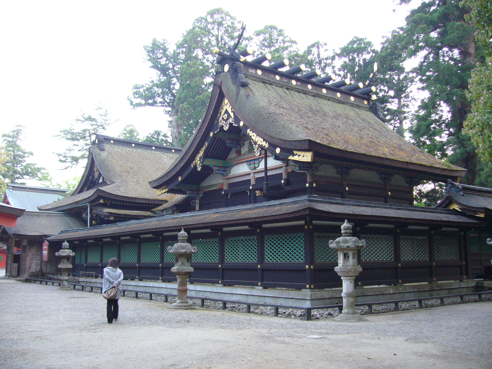 katori-jinguu-shrine-honden,katori-city,japan